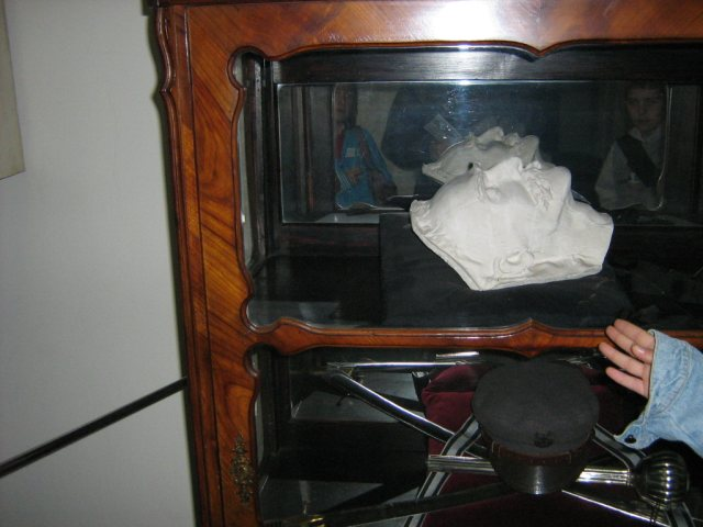 Dom im. Józefa Piłsudskiego- maska pośmiertna marszałka. Autor zdjęcia- Marek Czerwiński.